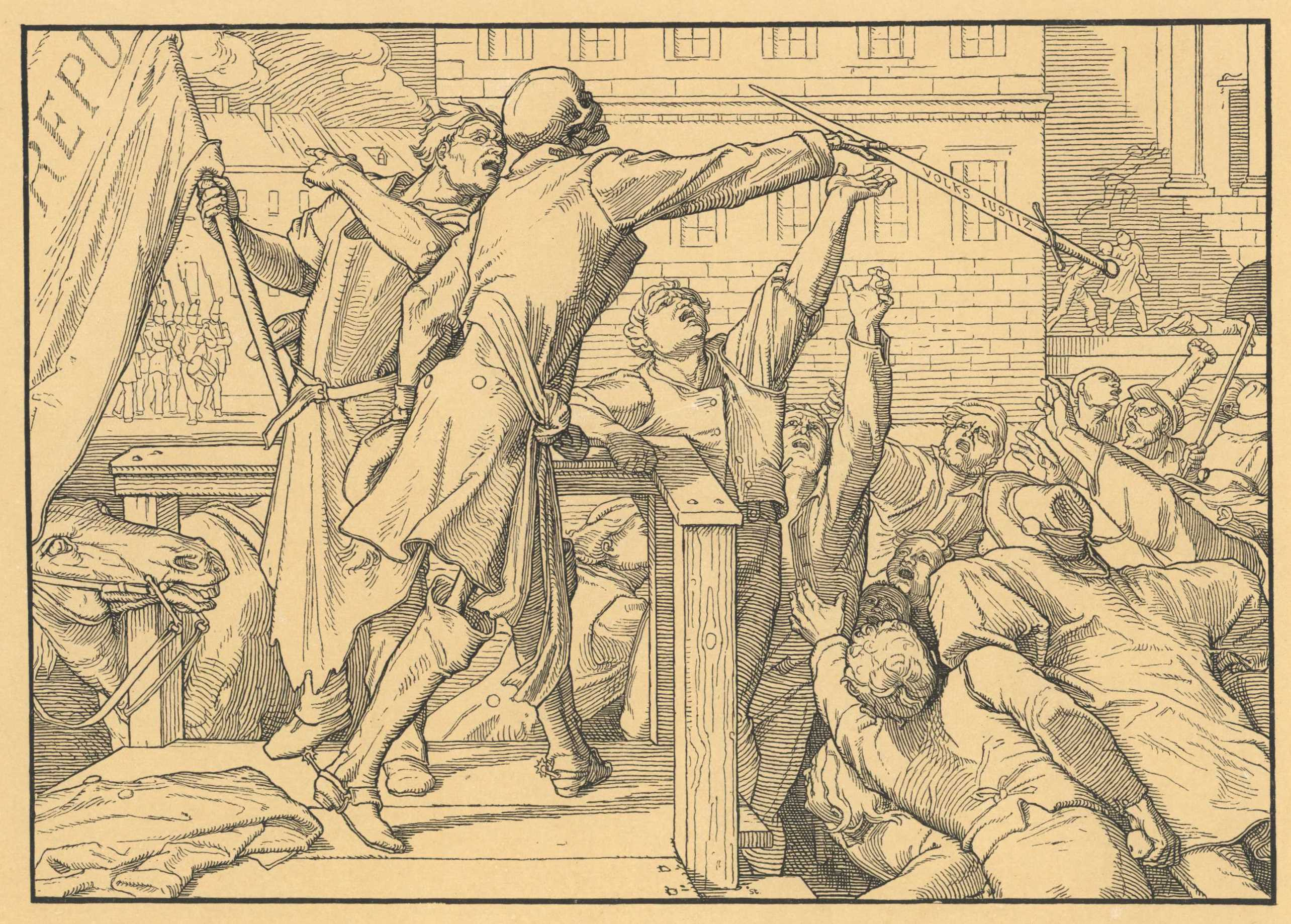 Auch ein Totentanz aus dem Jahre 1848, Blatt IV (Der Tod reicht dem Volke das Schwert) Bildbeschreibung im Artikel Alfred Rethel in der ADB: Als Volksbeglücker reicht er dem Pöbel, der Barrikaden errichtet hat, sein Schwert zur Selbsthülfe.Blatt 1 Blatt 2 Blatt 3 Blatt 4 Blatt 5 Blatt 6 der Serie